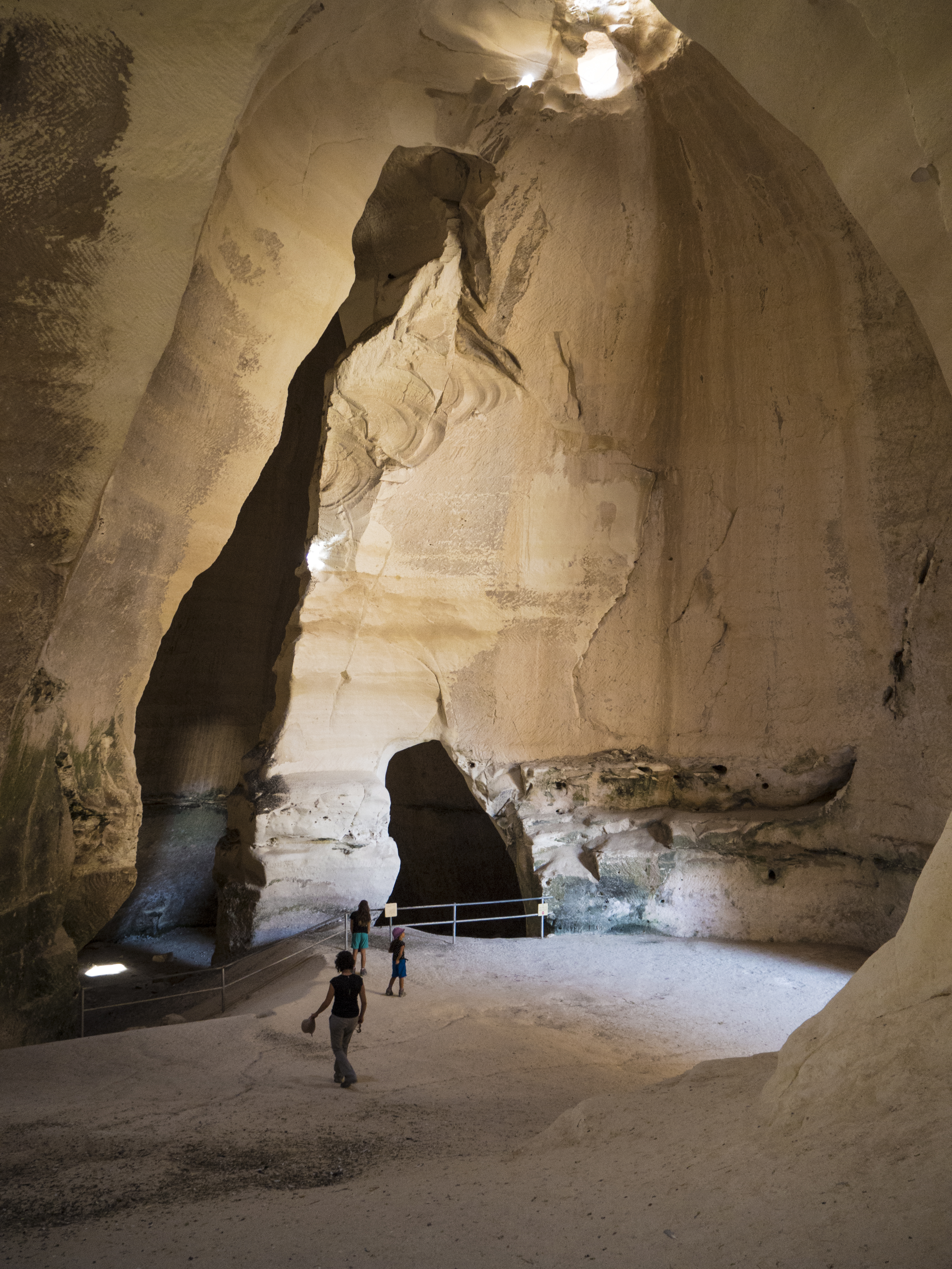 עיר קדומה בשפלת יהודה, בין נחל גוברין לנחל מרשה, סמוך לקיבוץ בית גוברין. נזכרת בכתביו של יוסף בן מתתיהו (יוספוס פלאביוס) כ"בית גברי", ובמקורות חז"ל כ "בית גובריא". משמעו של השם בארמית הוא "בית הגברים", וע"פ המדרש ישבו במערות סביב היישוב ענקים, ומכאן שמה. ביוני 2014 הכריז ארגון אונסק"ו על בית גוברין ומרשה הסמוכה כאתר מורשת עולמית.